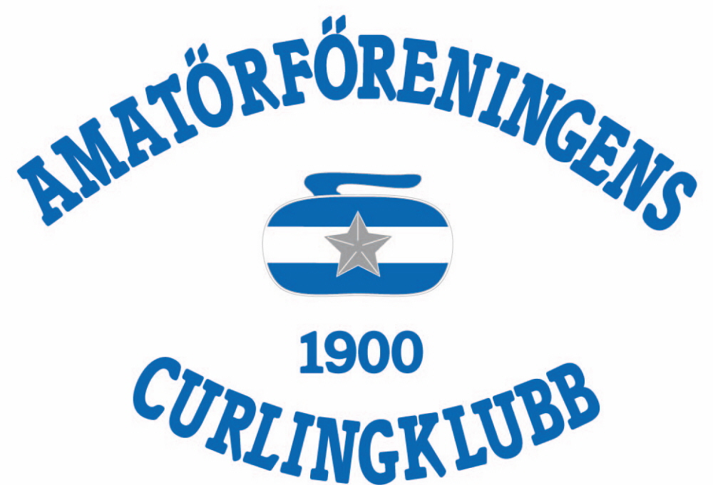 Amatörföreningens emblem